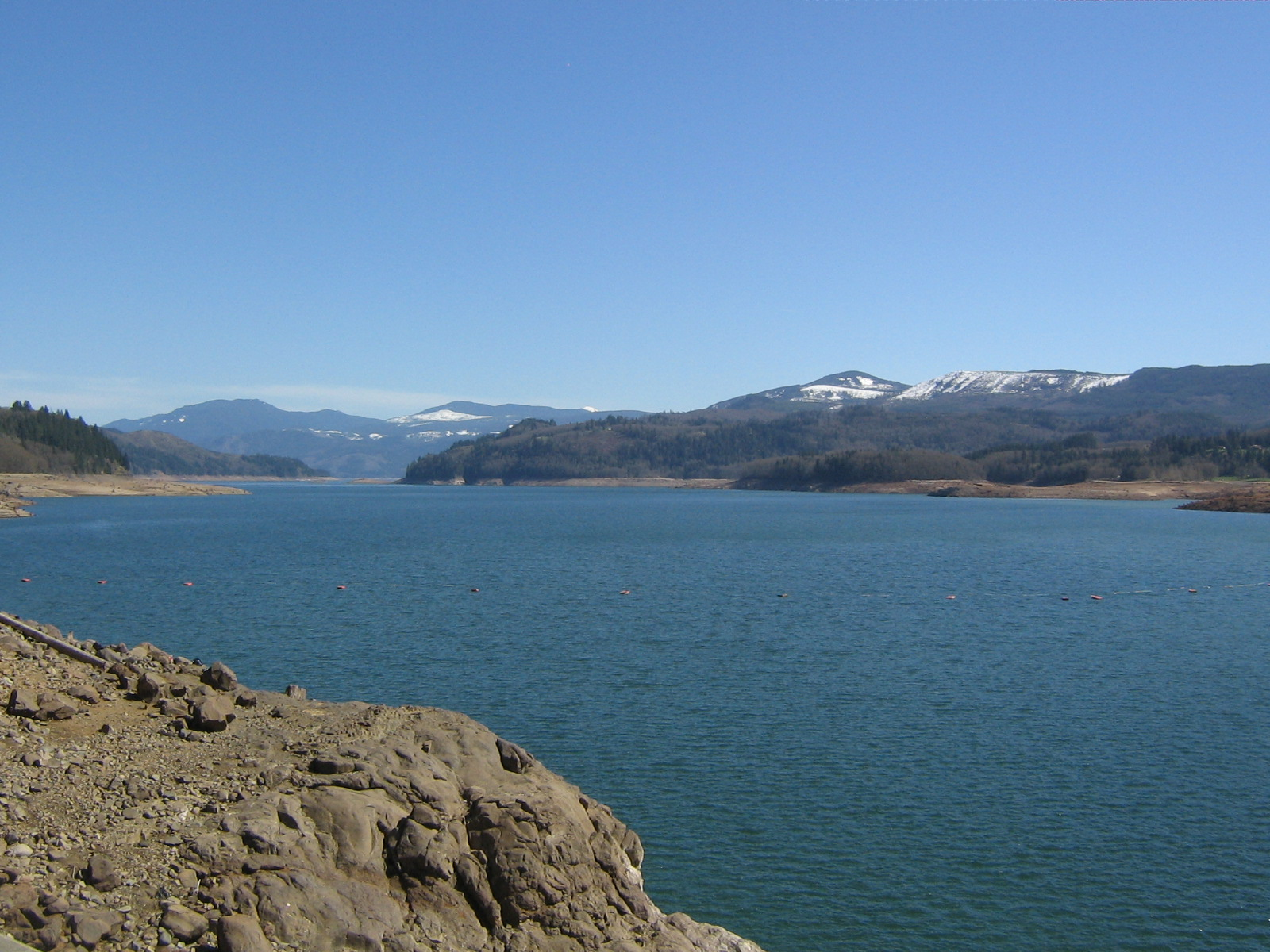 Riffe Lake, taken from U.S. Route 12